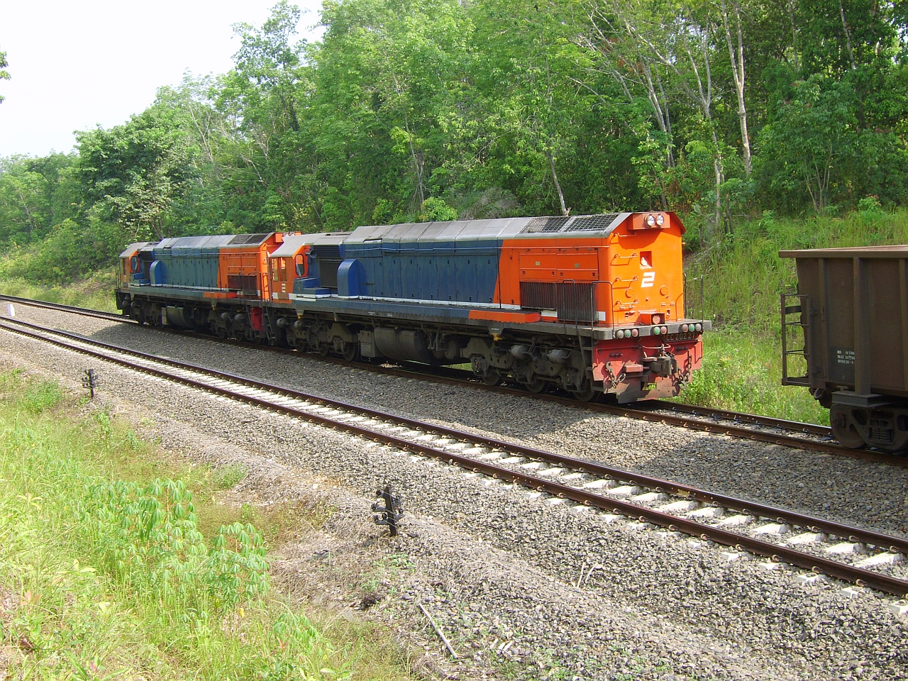 Ptkacc202 (202 27 B)